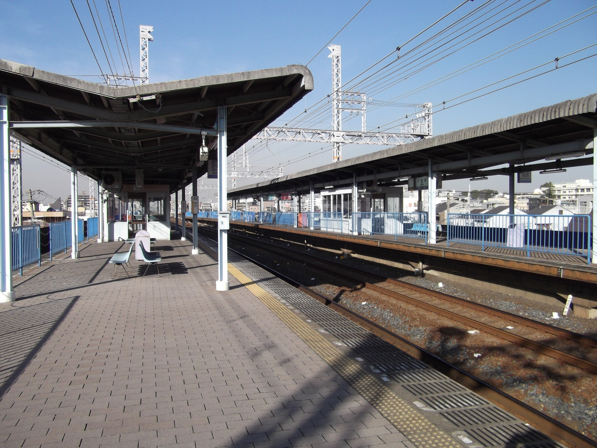 南海本線粉浜駅ホーム（上りホームから難波方面へ向けて撮影）